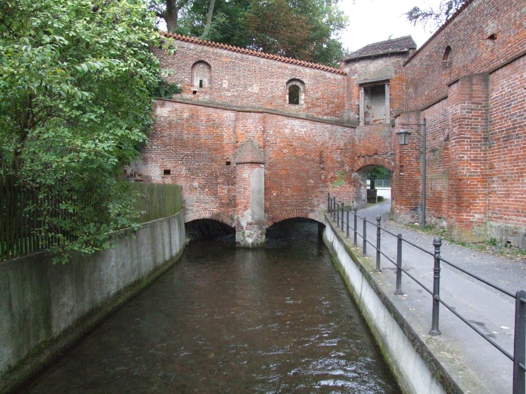 Austritt der Memminger Aach beim Luginsland